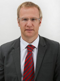 Felipe José Kast Sommerhoff